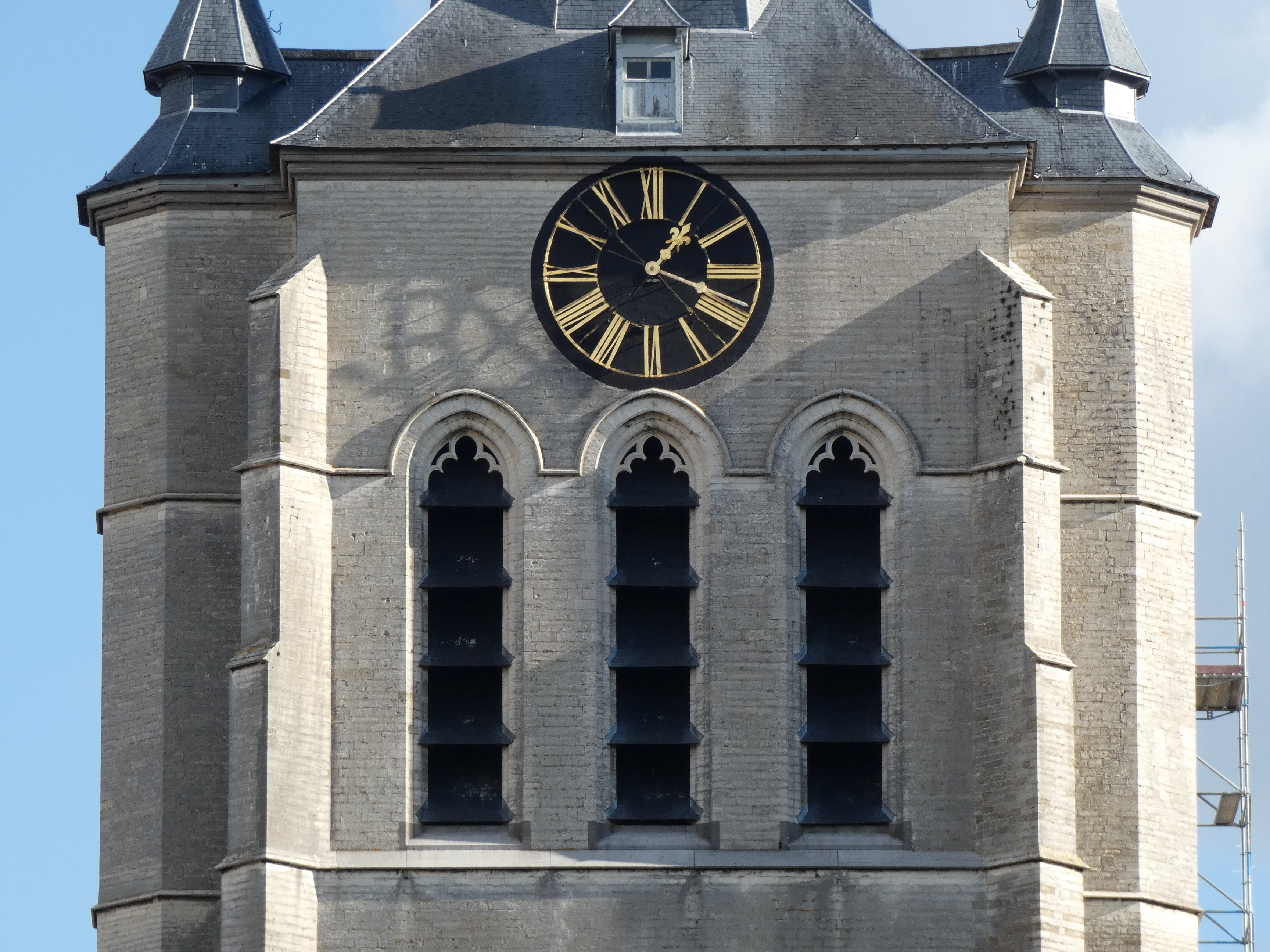 Achter de galmgaten van de Onze-Lieve-Vrouwetoren bevindt zich de klokkenkamer. Daar hangen de luidklokken en bevindt zich de Vredesbeiaard met 51 klokken.